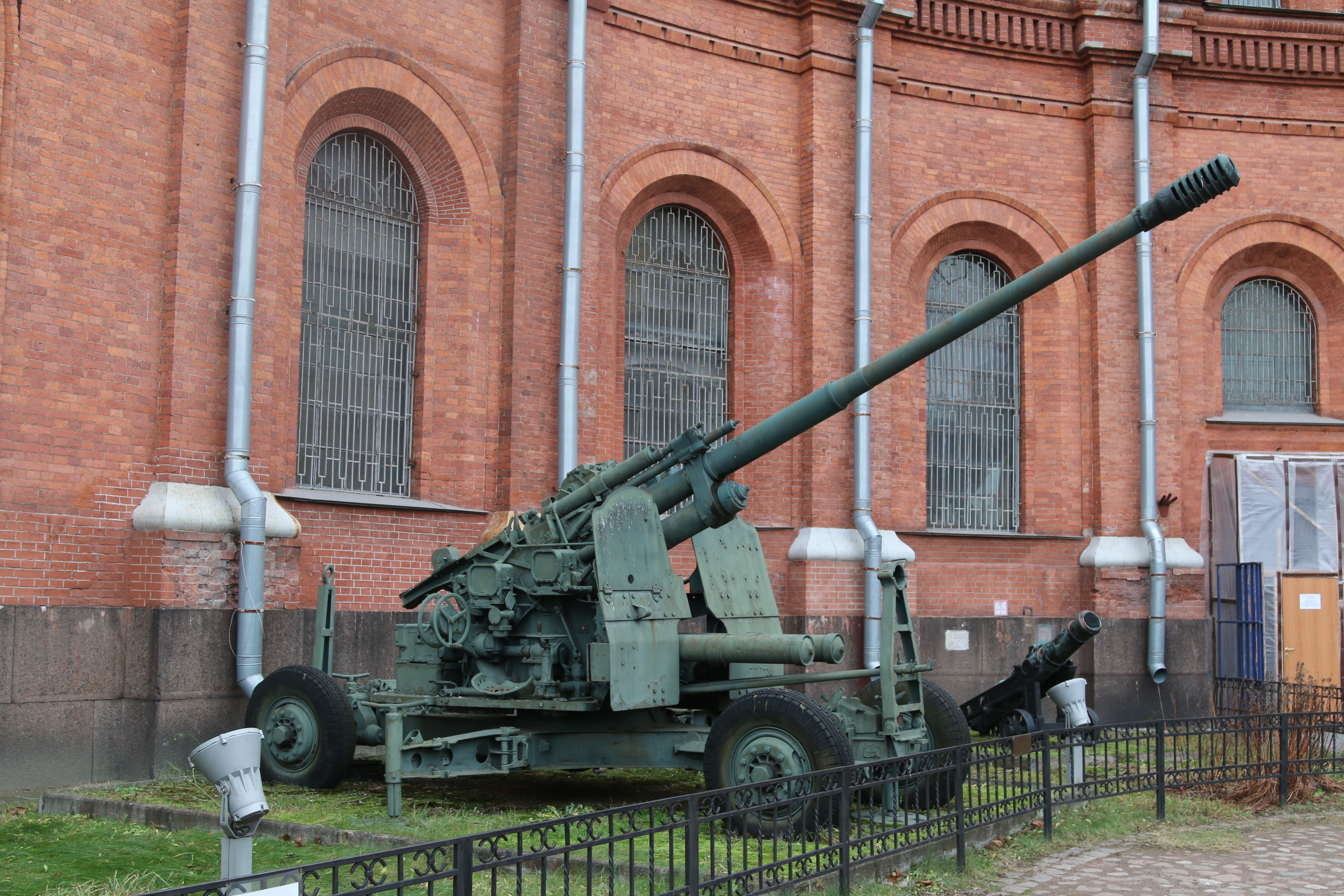 100 мм зенитная пушка КС-19 (1948 год). Главный конструктор Л.В. Люльев.